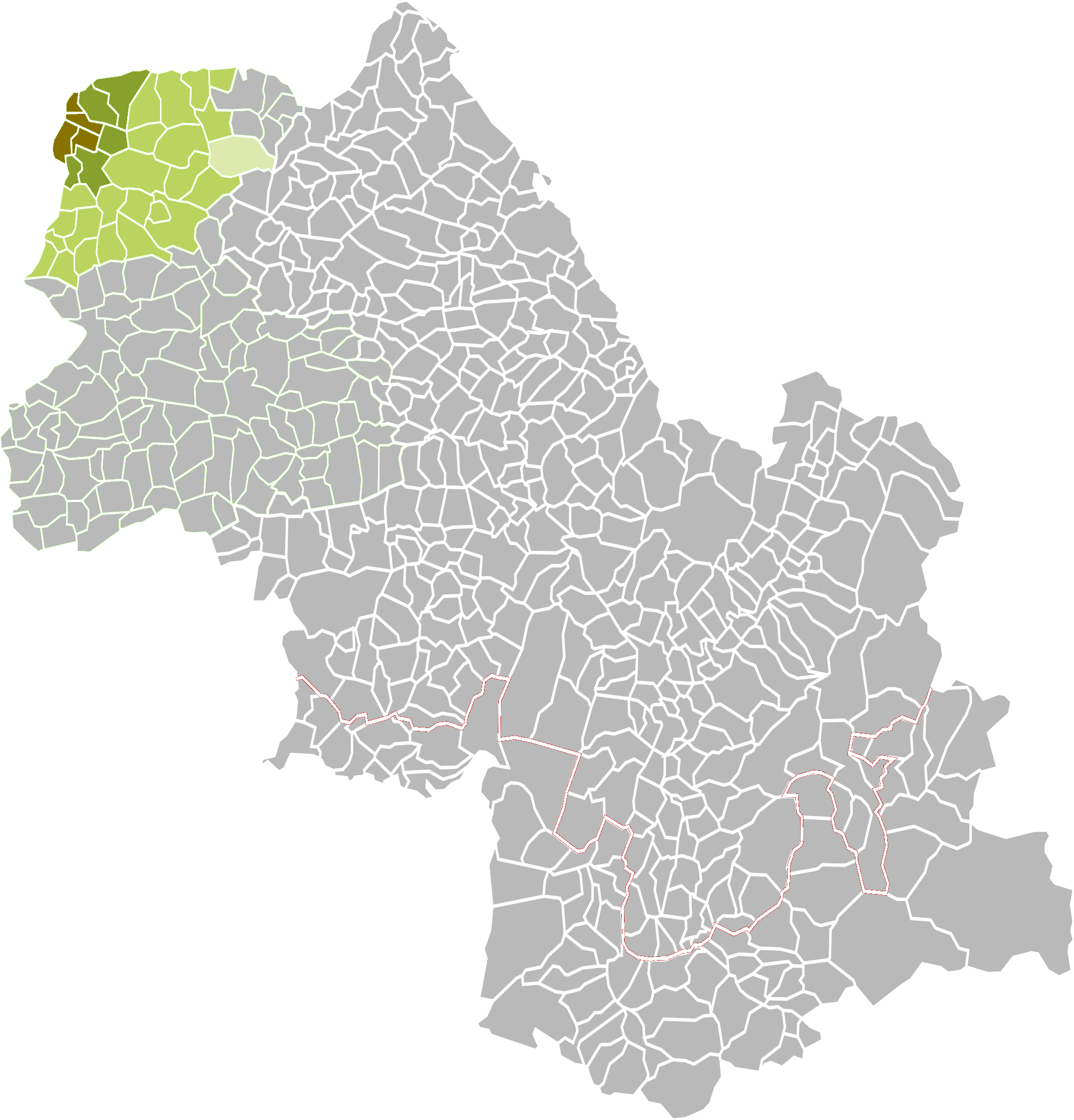 Evolution territoriale de l'Isere de 1800 à 1971